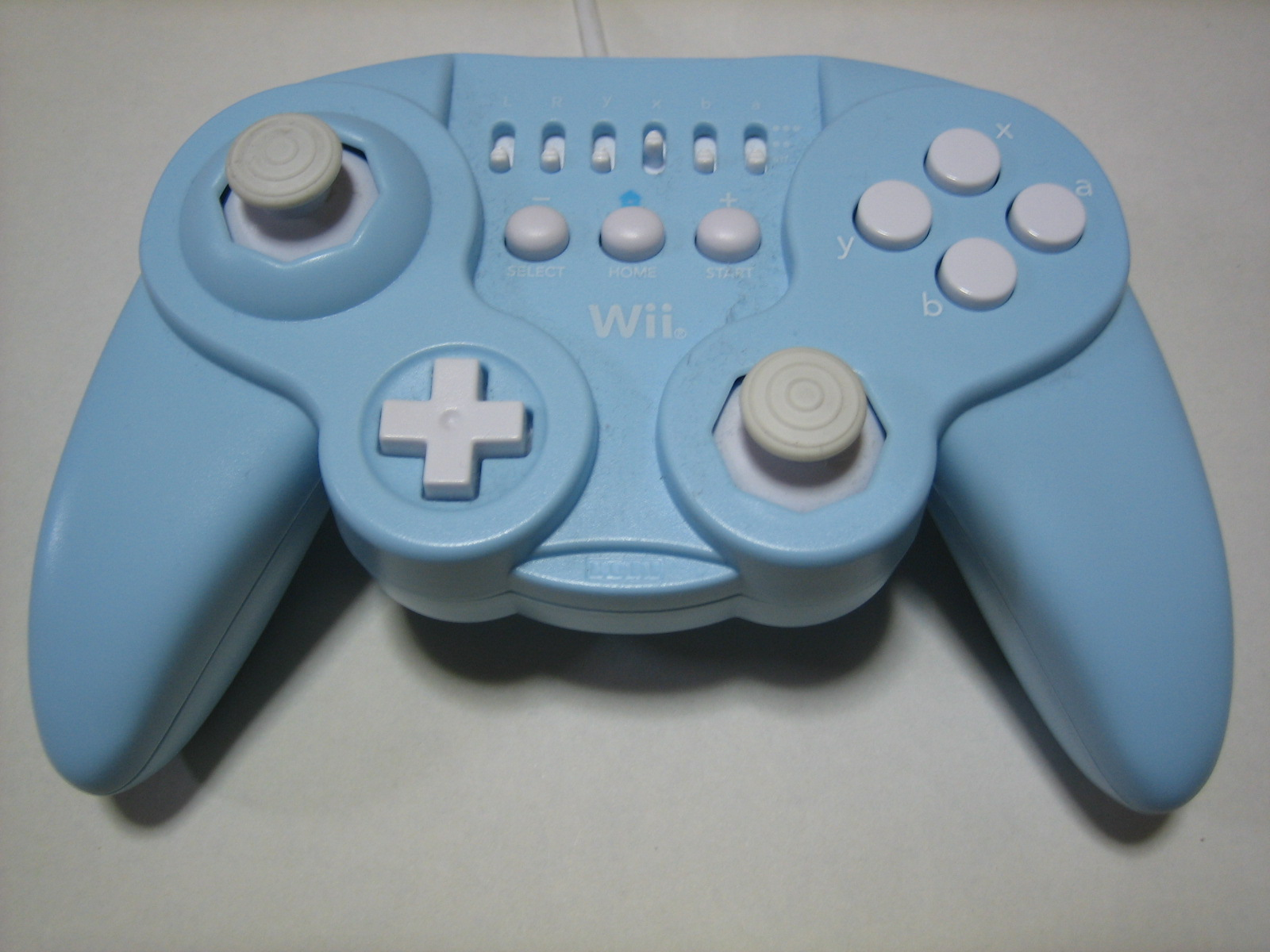 HORI_classic_controller